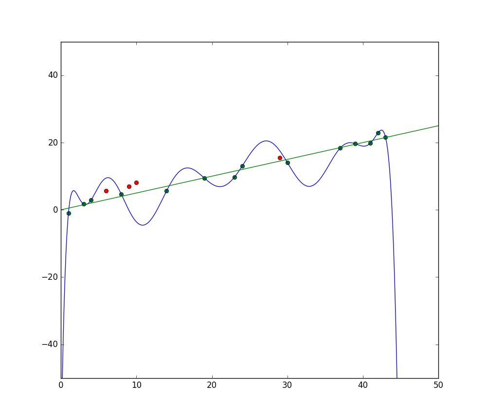 Illustration du surapprentissage sur un problème de régression 2D.